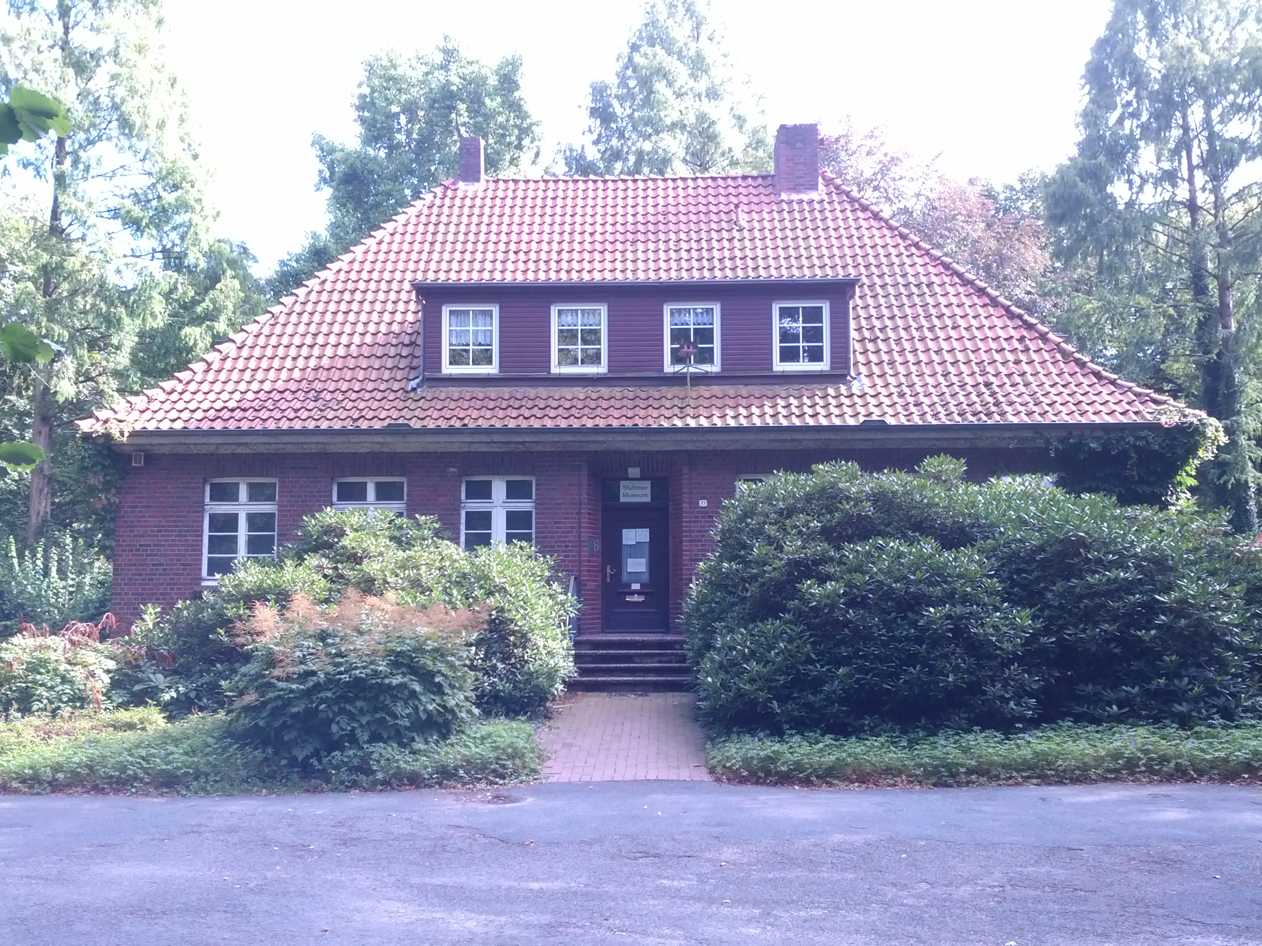 Stuhmer Museum, Bremervöör